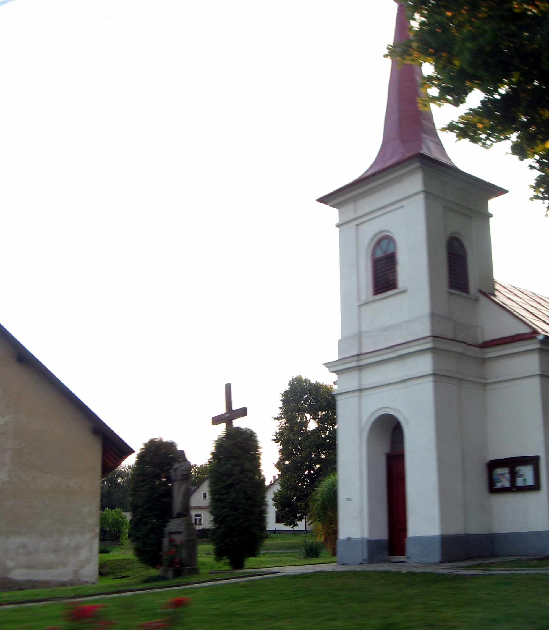 Nová Ves u Nového Města na Moravě, kostel